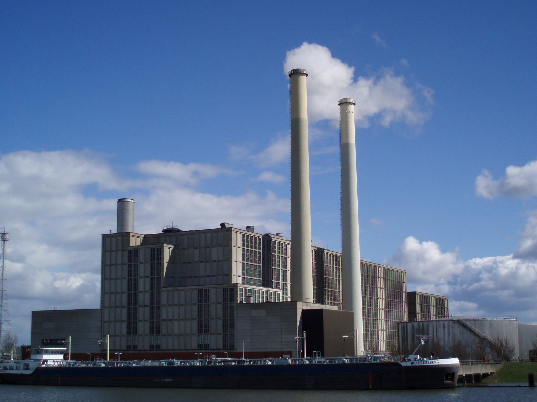 De IJsselcentrale in Zwolle gezien vanaf de dijk bij Oldeneel in Zwolle-Zuid.